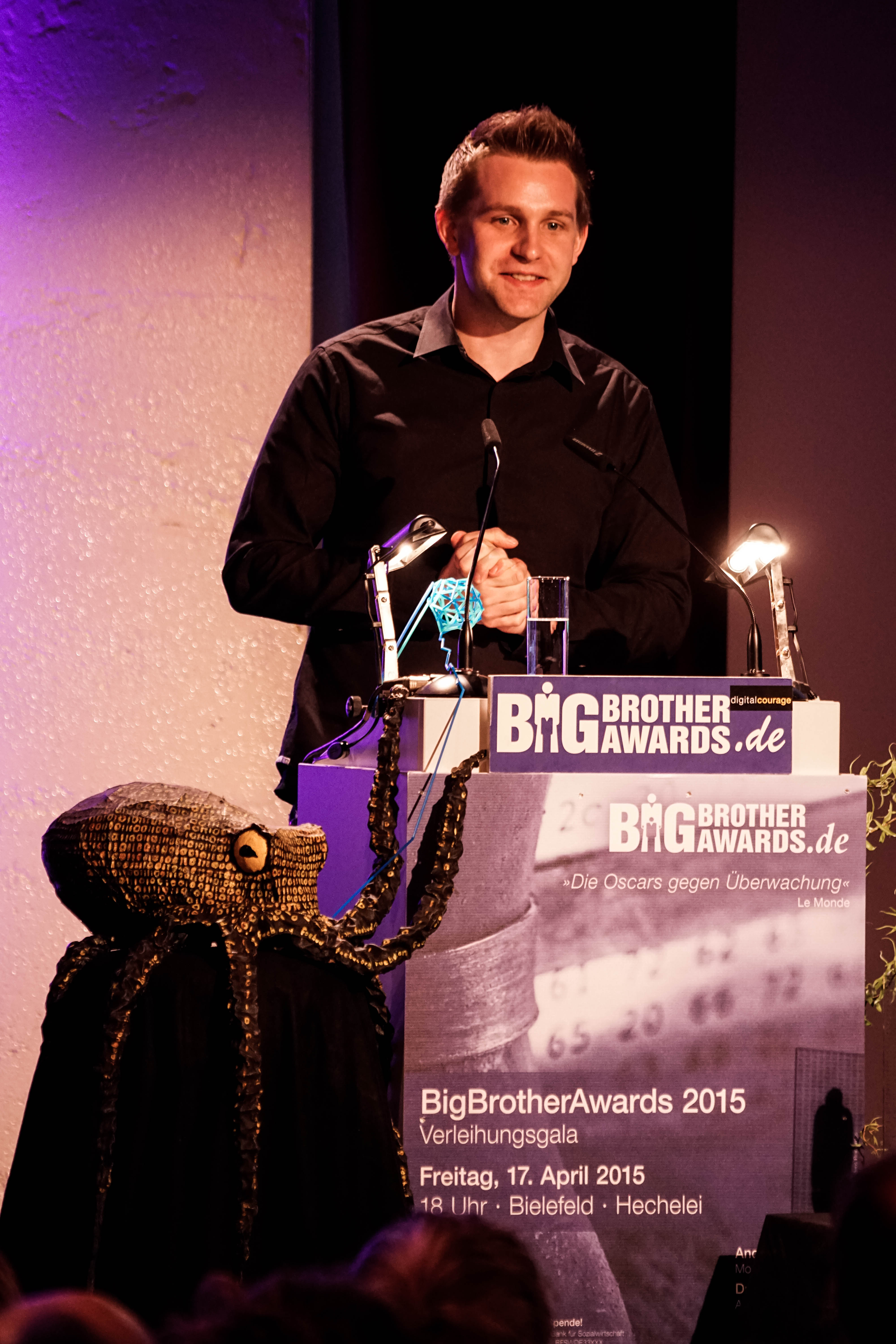 Bei den Big Brother Awards 2015 von Digitalcourage e.V. in Bielefeld.